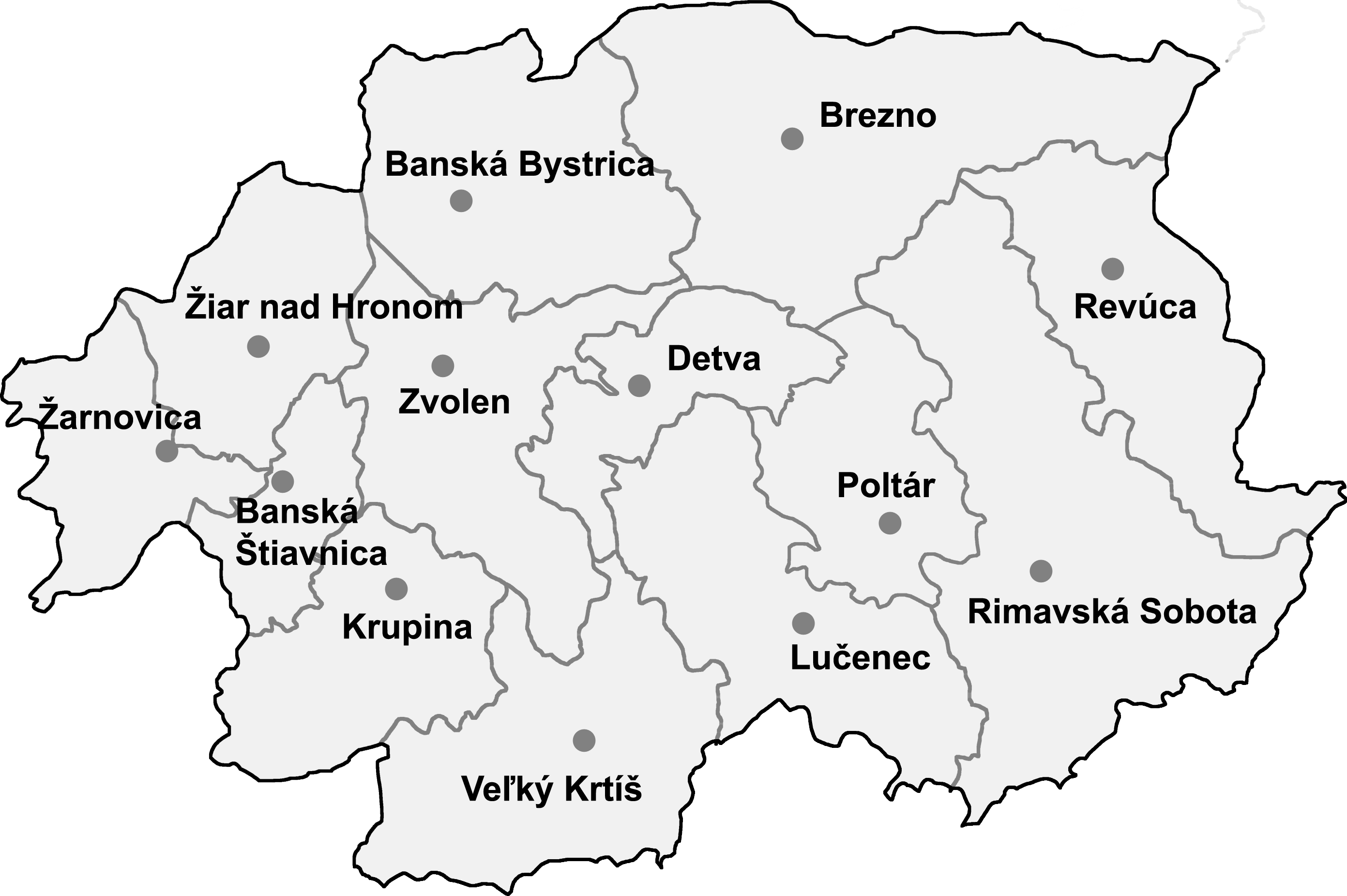 Map of Banská Bystrica Region (kraj), with districts (okresy) — central Slovakia.